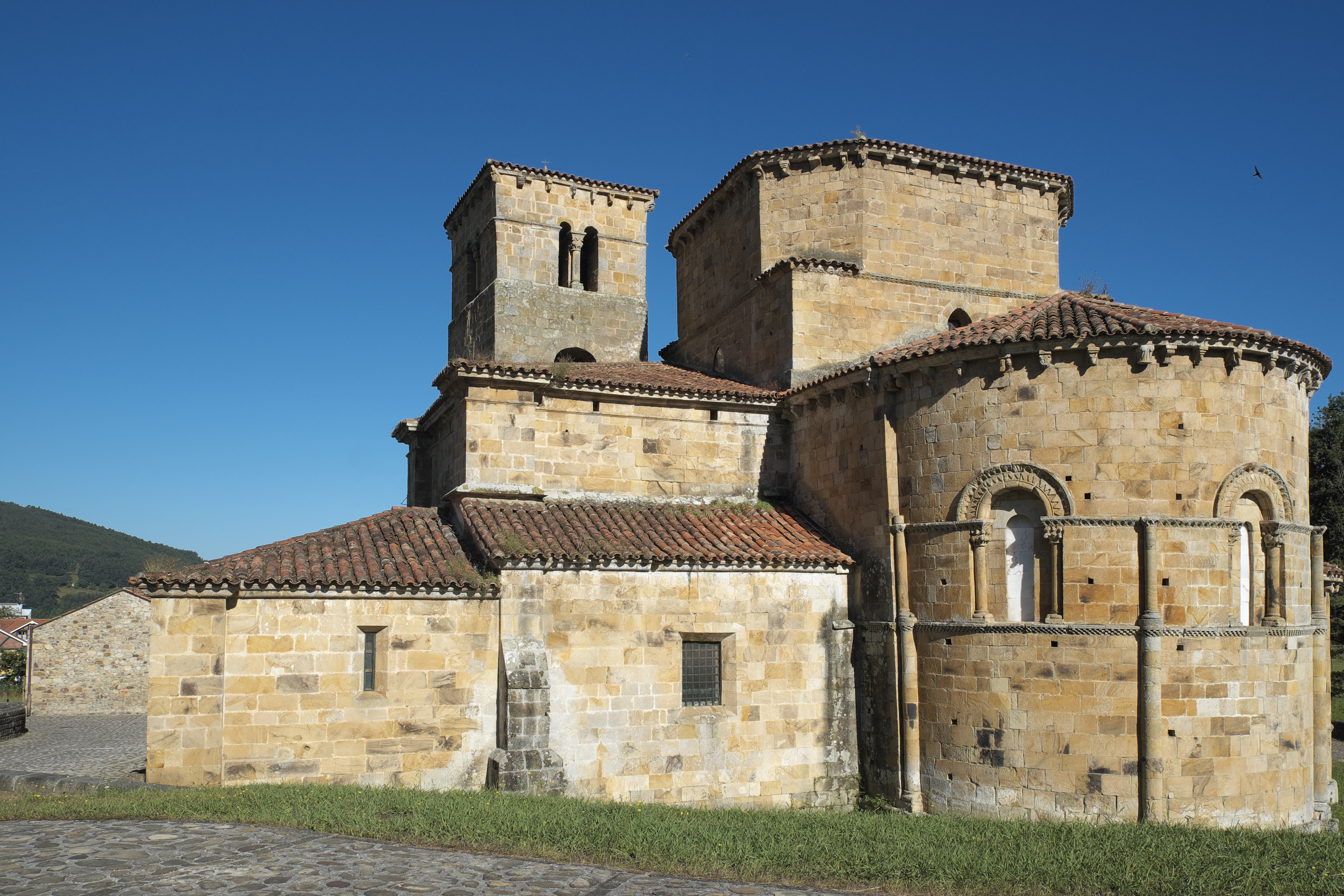 Ehemalige Benediktinerklosterkirche Colegiata de Santa Cruz in Castañeda in Kantabrien (Spanien)